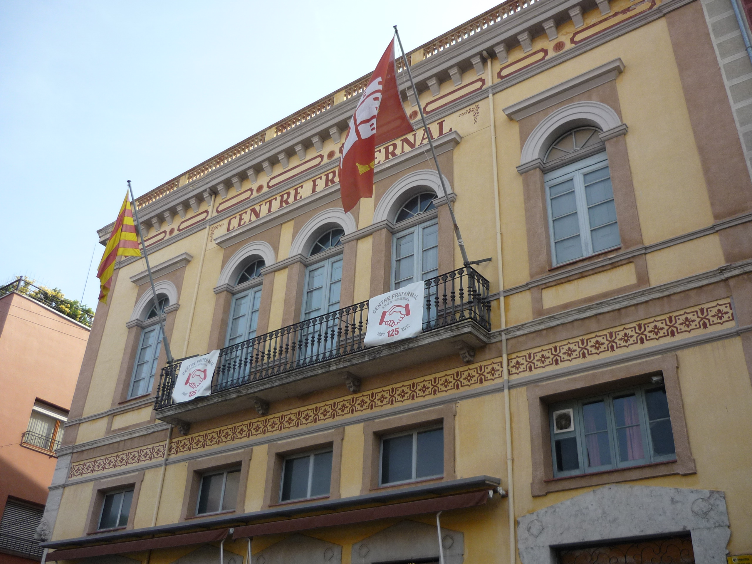 Centre Fraternal (Palafrugell)